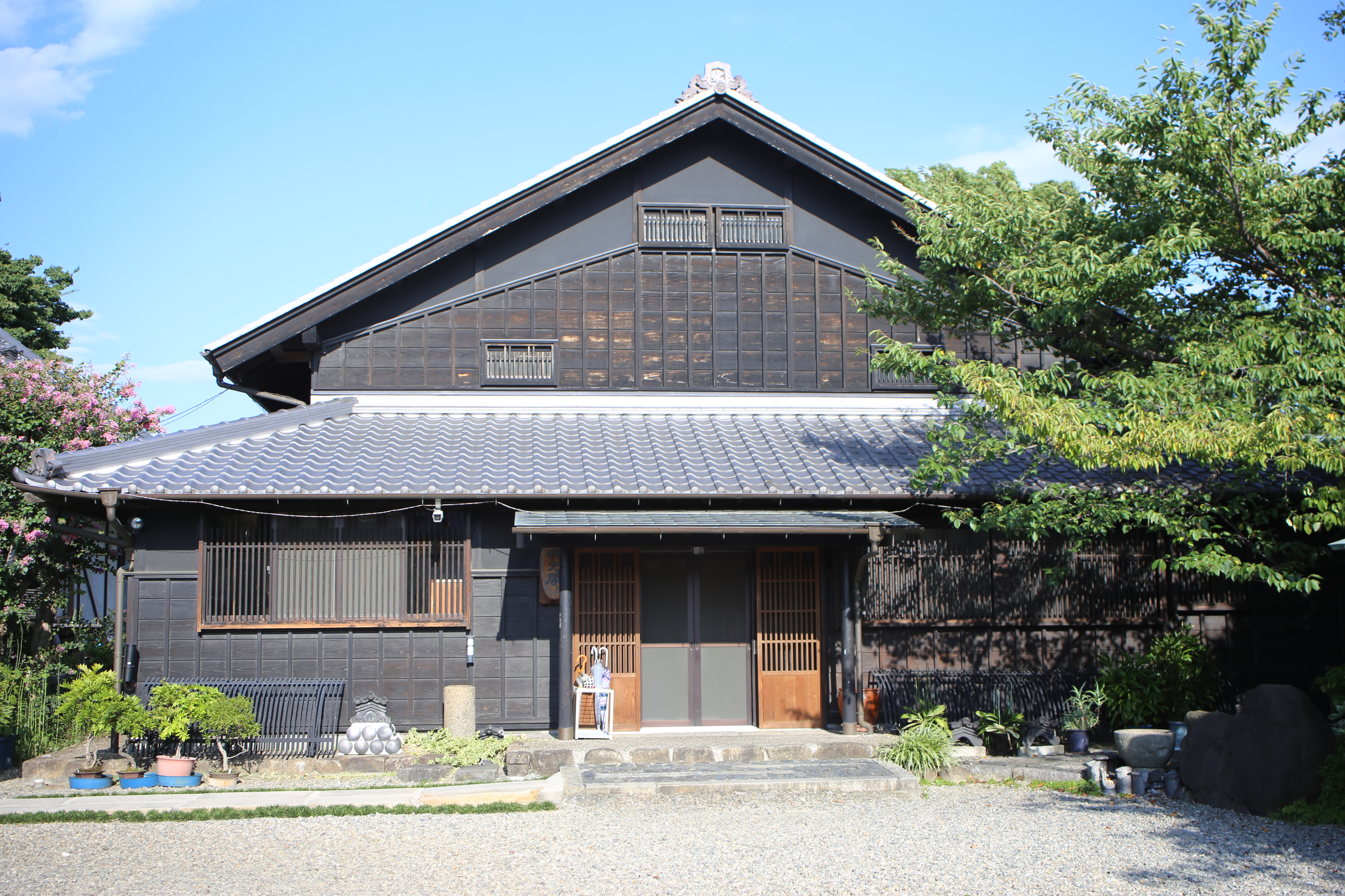 名古屋市西区中小田井一丁目の善光寺別院願王寺。書院明光閣。町並み保存地区内にあった旧平手邸を移築。